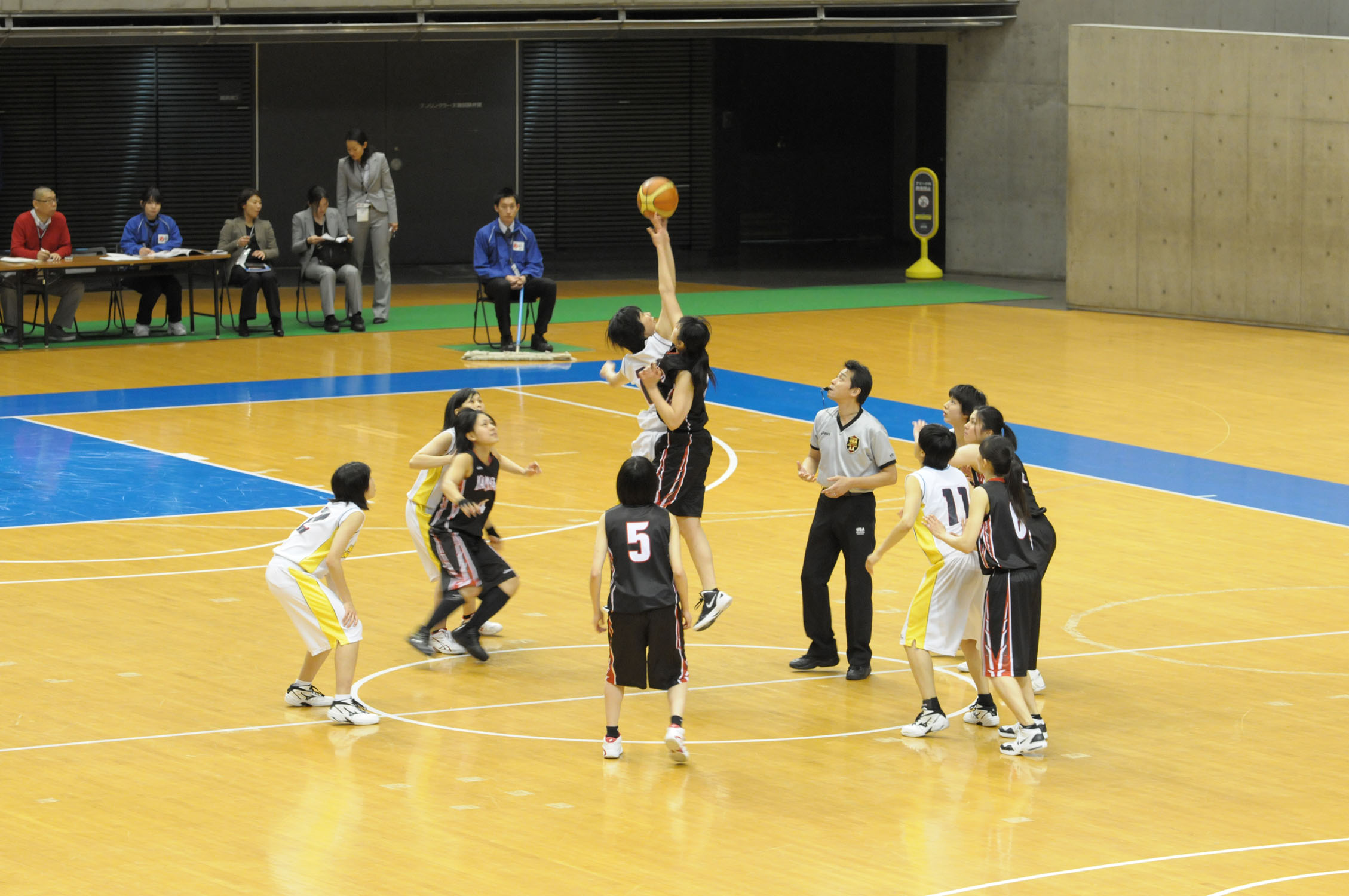 2012年全日本総合バスケットボール選手権大会2回戦、大阪人間科学大学対山形大学。東京体育館で。